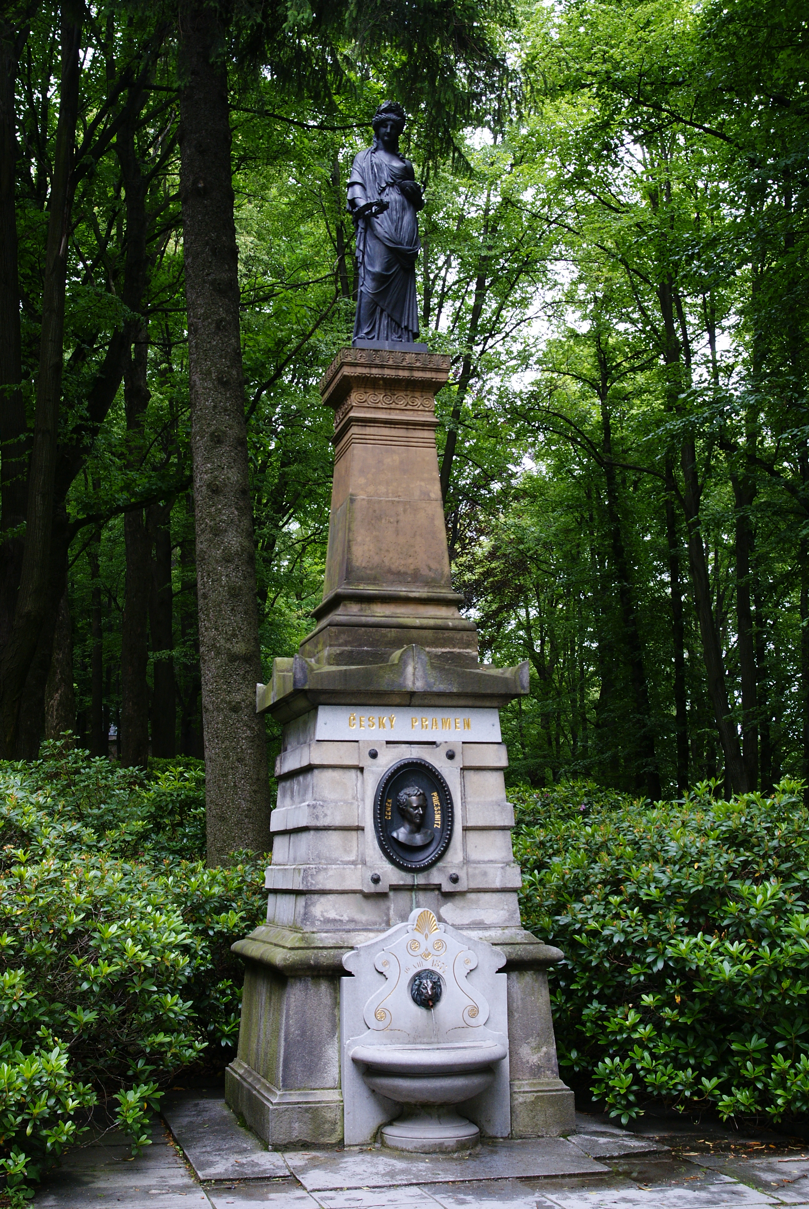 Pomník český se sochou Hygie (Jeseník), na promenádním okruhu v parku, Jeseník